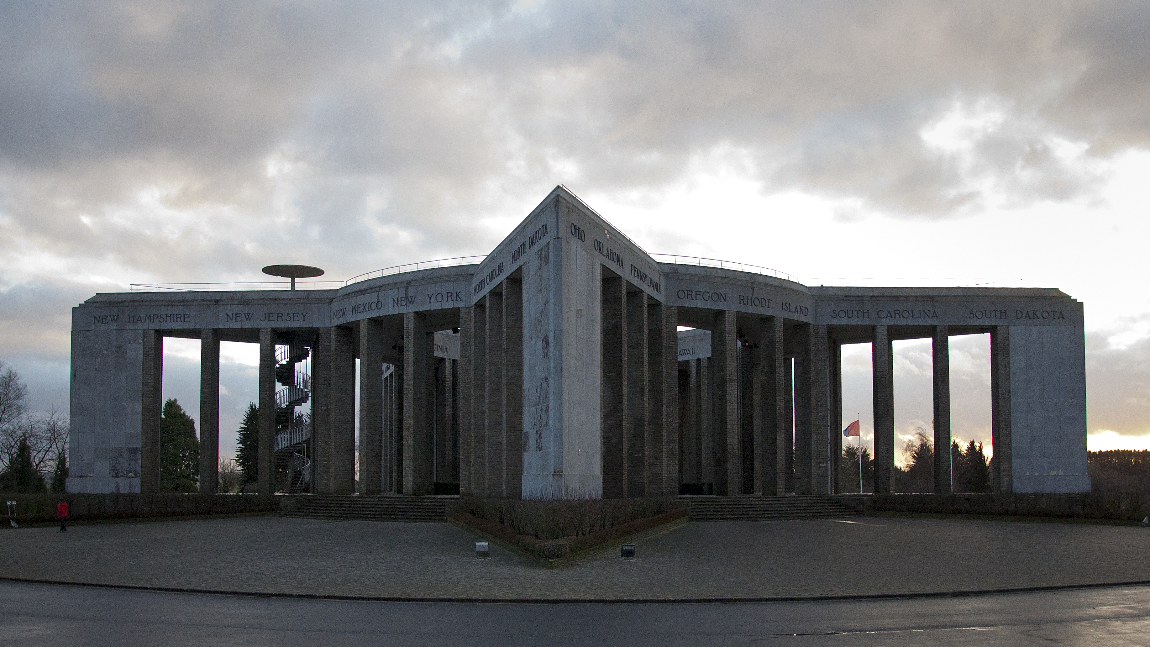 Mémorial du Mardasson te Bastenaken, België